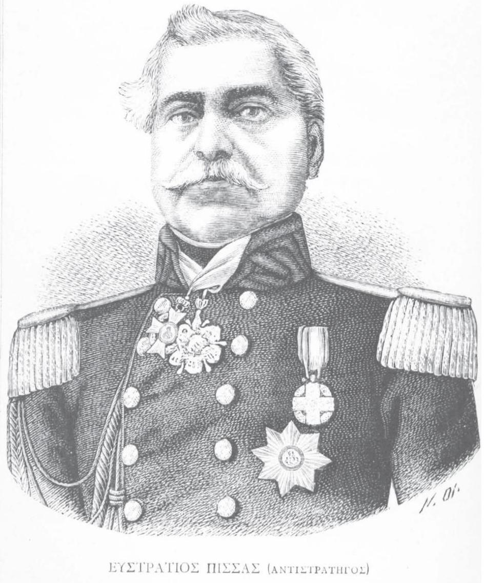 nahmhafte Griechische Persönlichkeit, 19. Jahrhundert